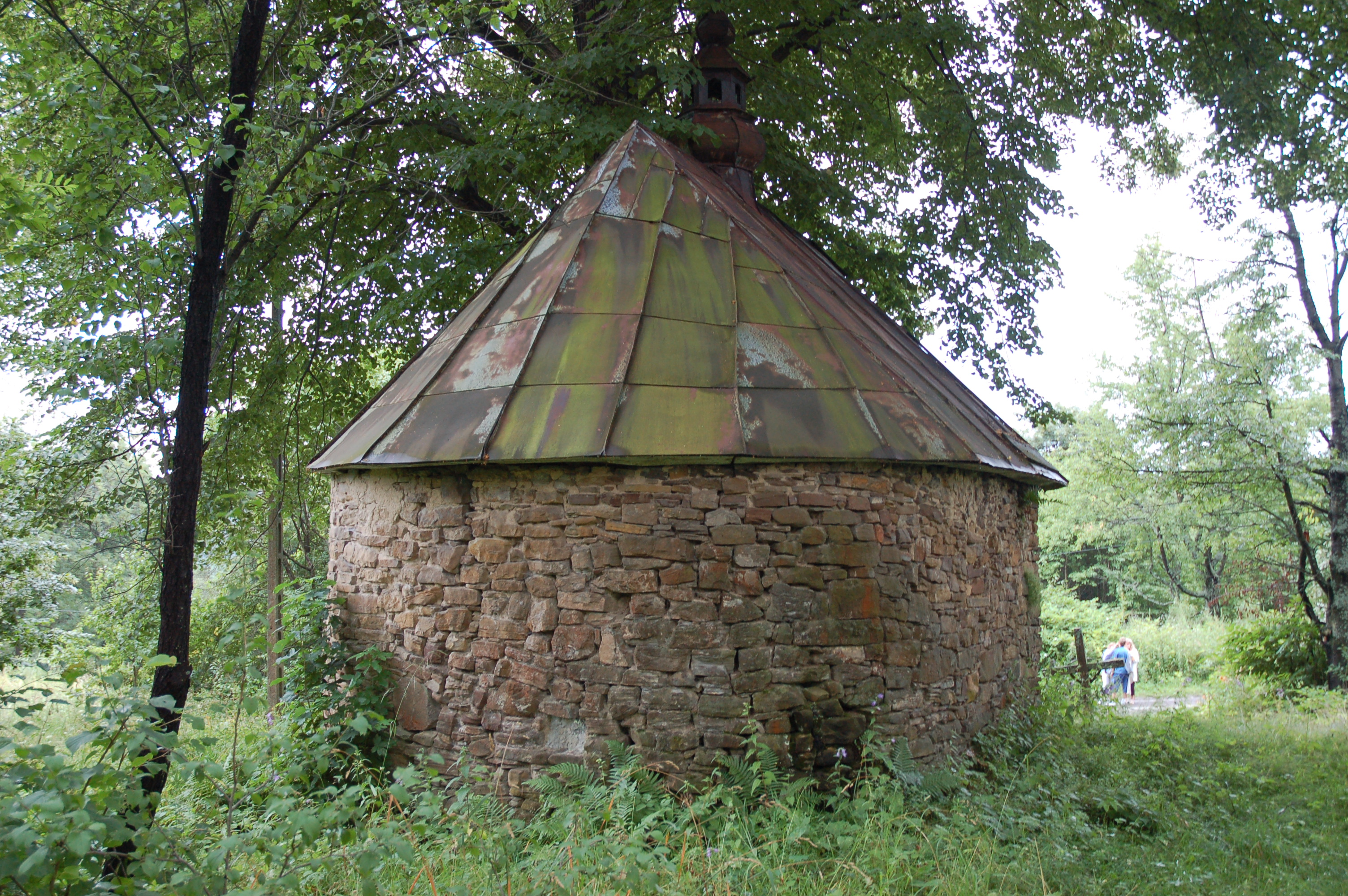 Kapliczka przydrożna w Kotowie